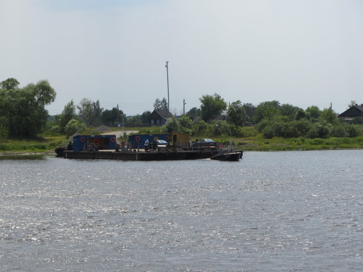 Паром Снядзін-Вышалаў цераз Прыпяць